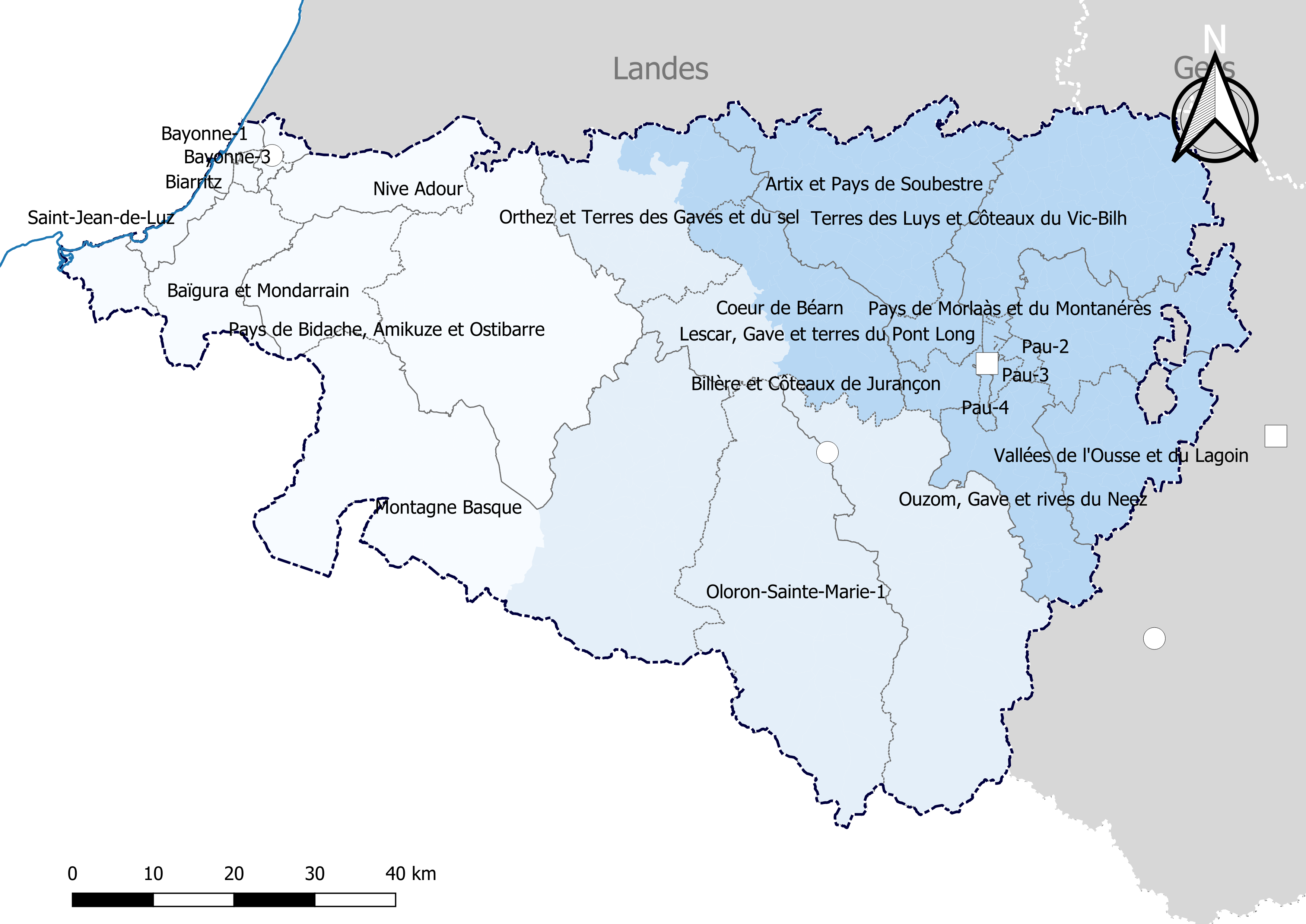 Carte du découpage cantonal du département des Pyrénées-Atlantiques (France), avec en surimpression les arrondissements (en nuances de bleu) - Carte arrêtée au 1er janvier 2019.